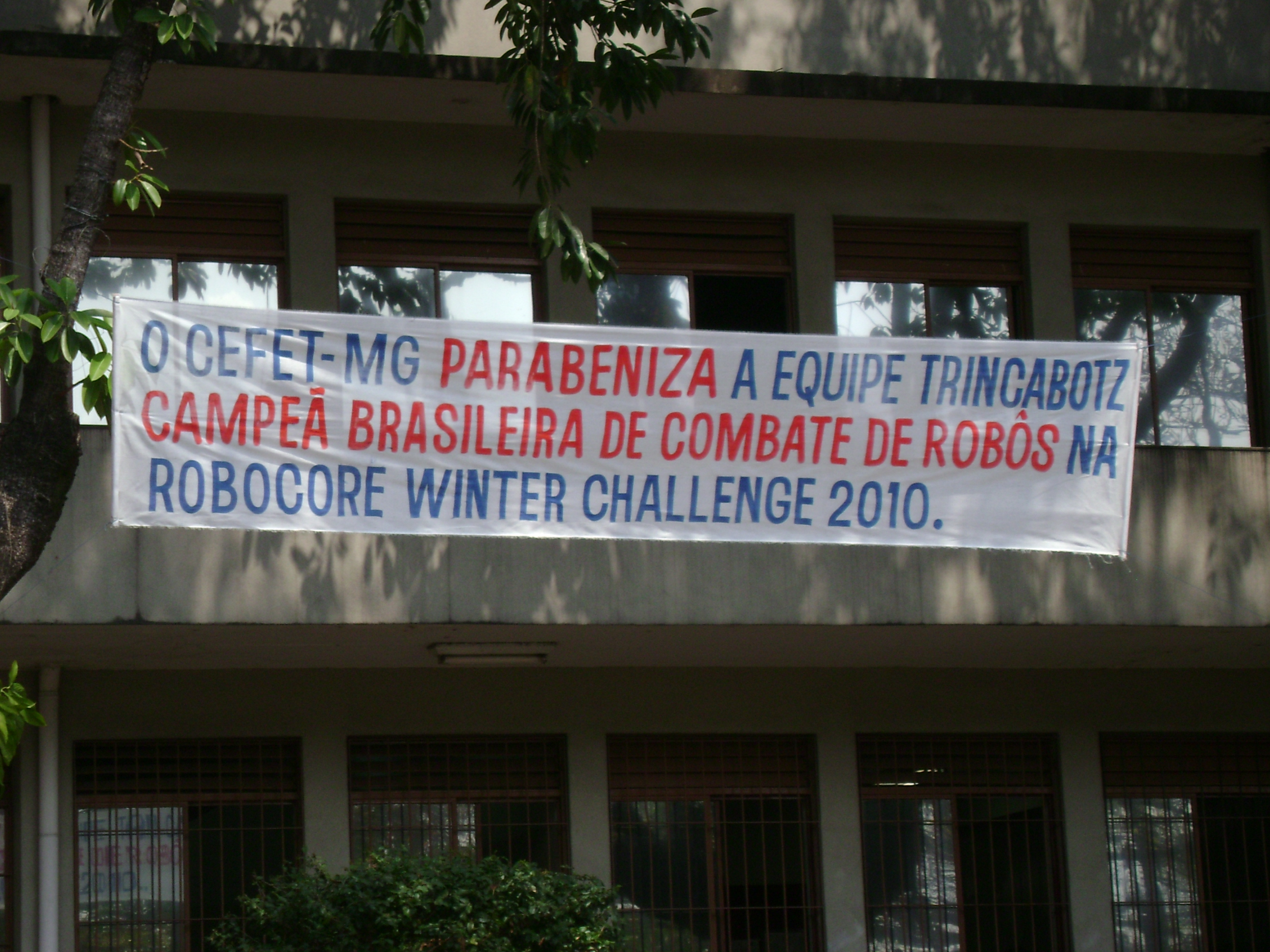 Faixa comemorativa de competição no campus II do Cefet-MG, em Belo Horizonte.